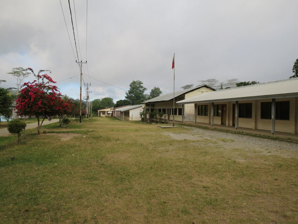 Remexio Vila